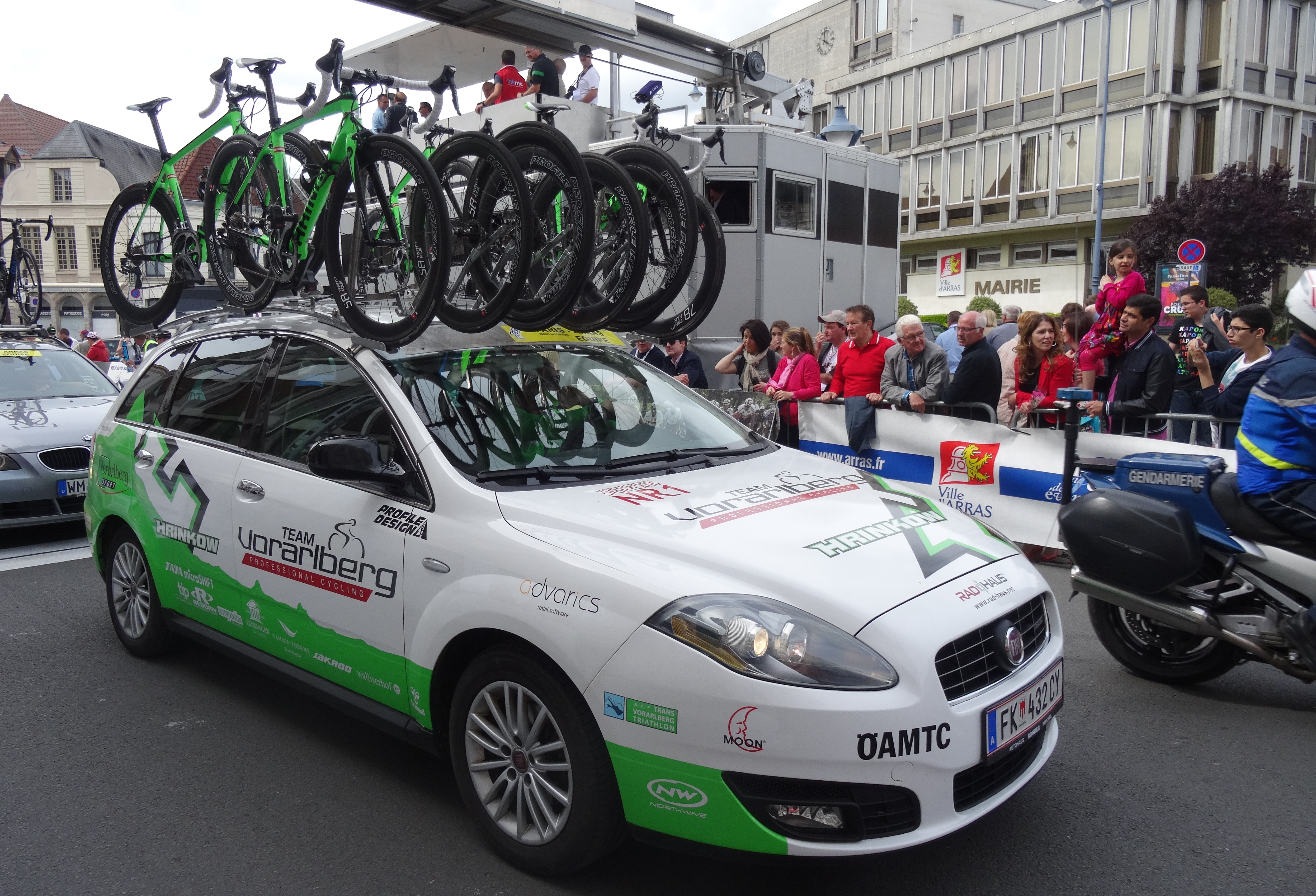 Reportage photographique réalisé le dimanche 25 mai 2014 à l'occasion du départ et de l'arrivée de la troisième étape du Paris-Arras Tour 2014 à Arras, Pas-de-Calais, Nord-Pas-de-Calais, France.